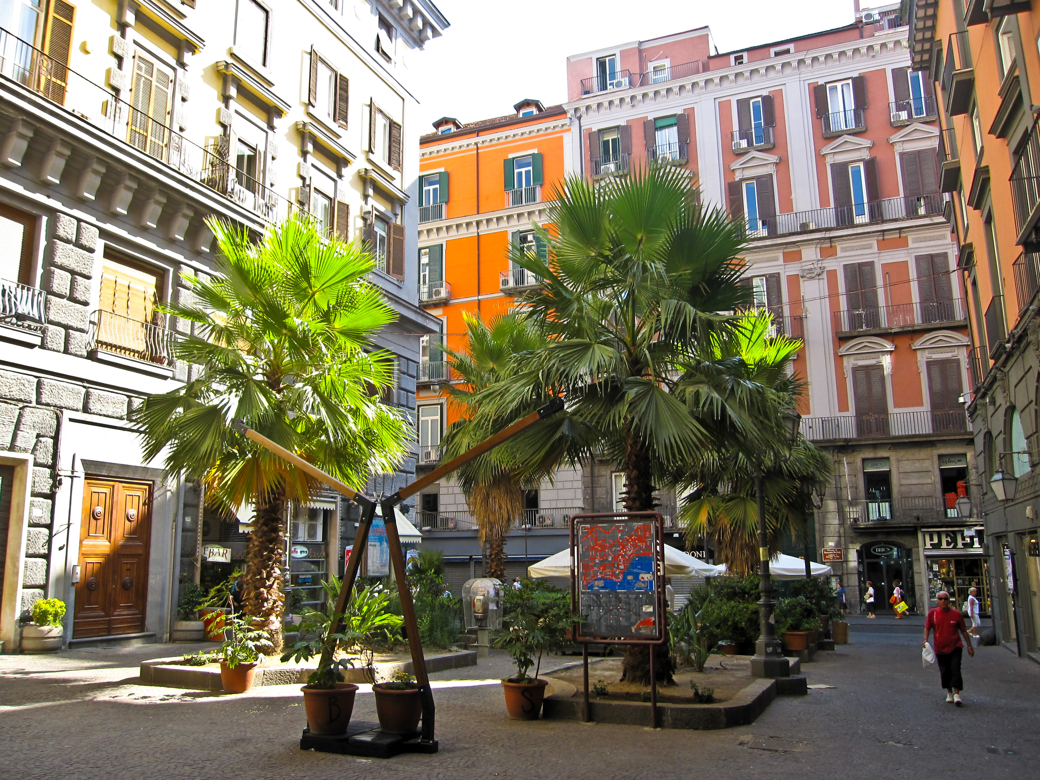 Piazzetta Duca d'Aosta o Largo Augusteo (Napoli). Frontalmente è visibile via Toledo, che passa parallela alla piazza.